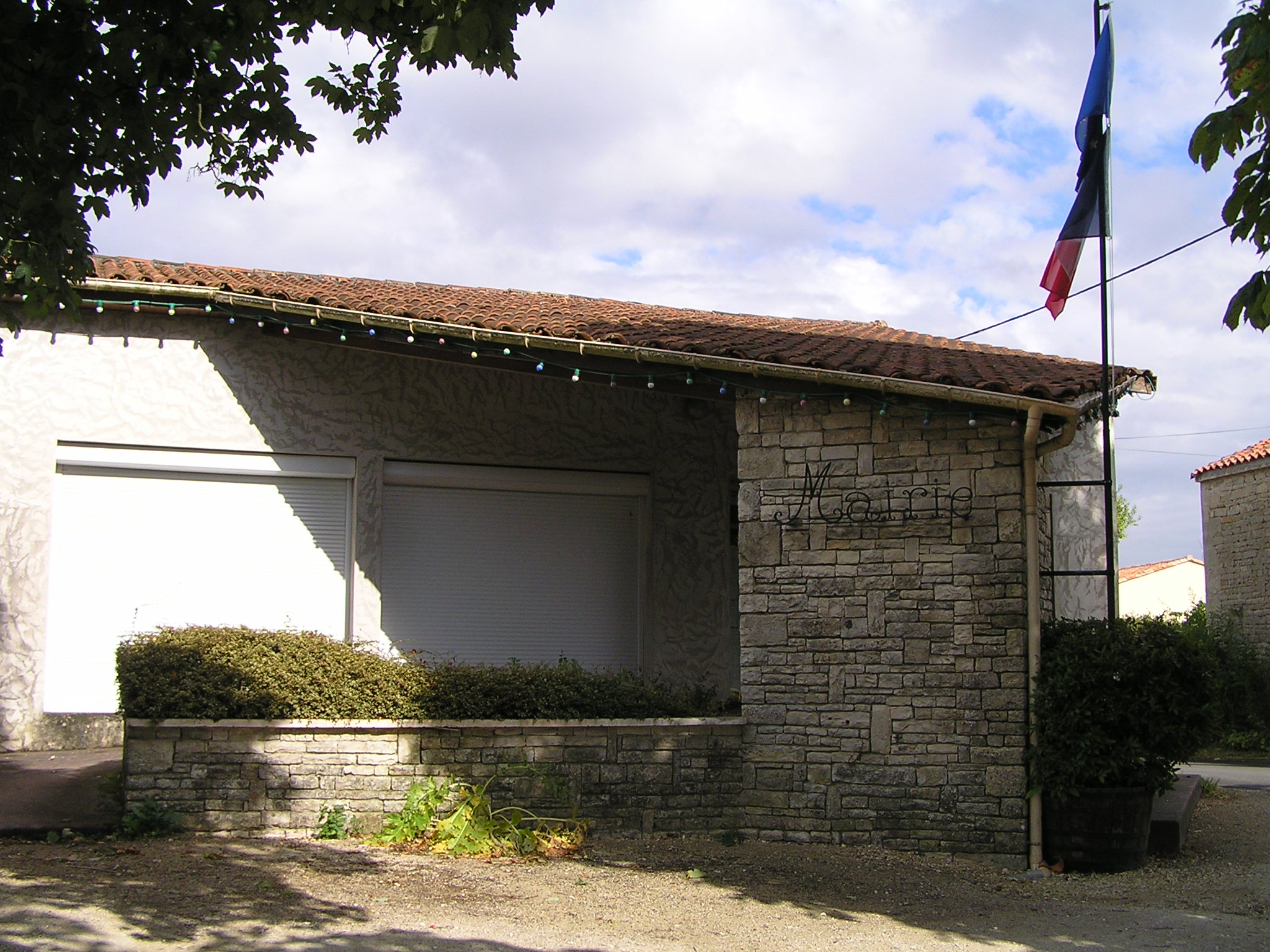 mairie de Cellettes